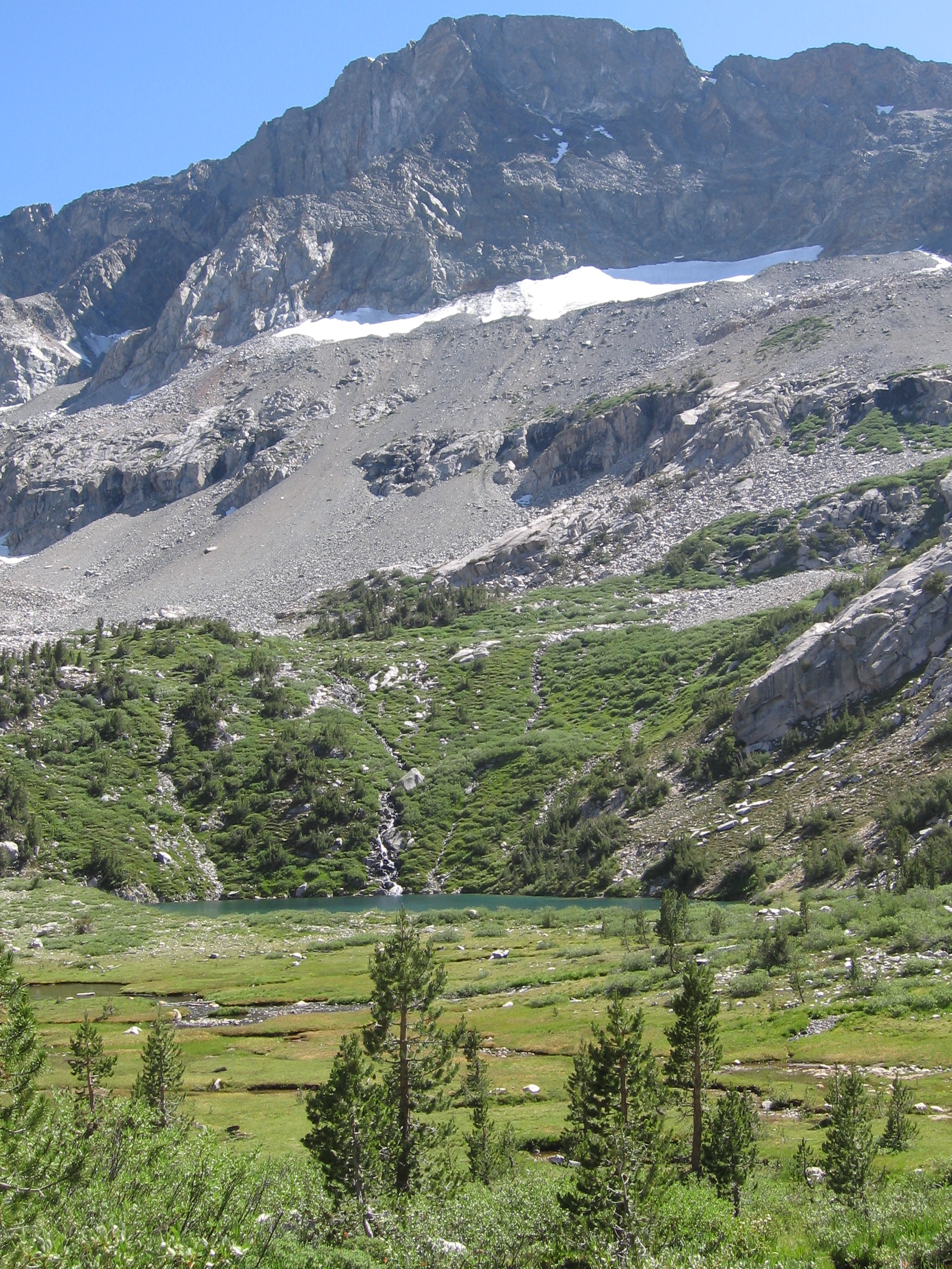 At the descent from Muir Pass